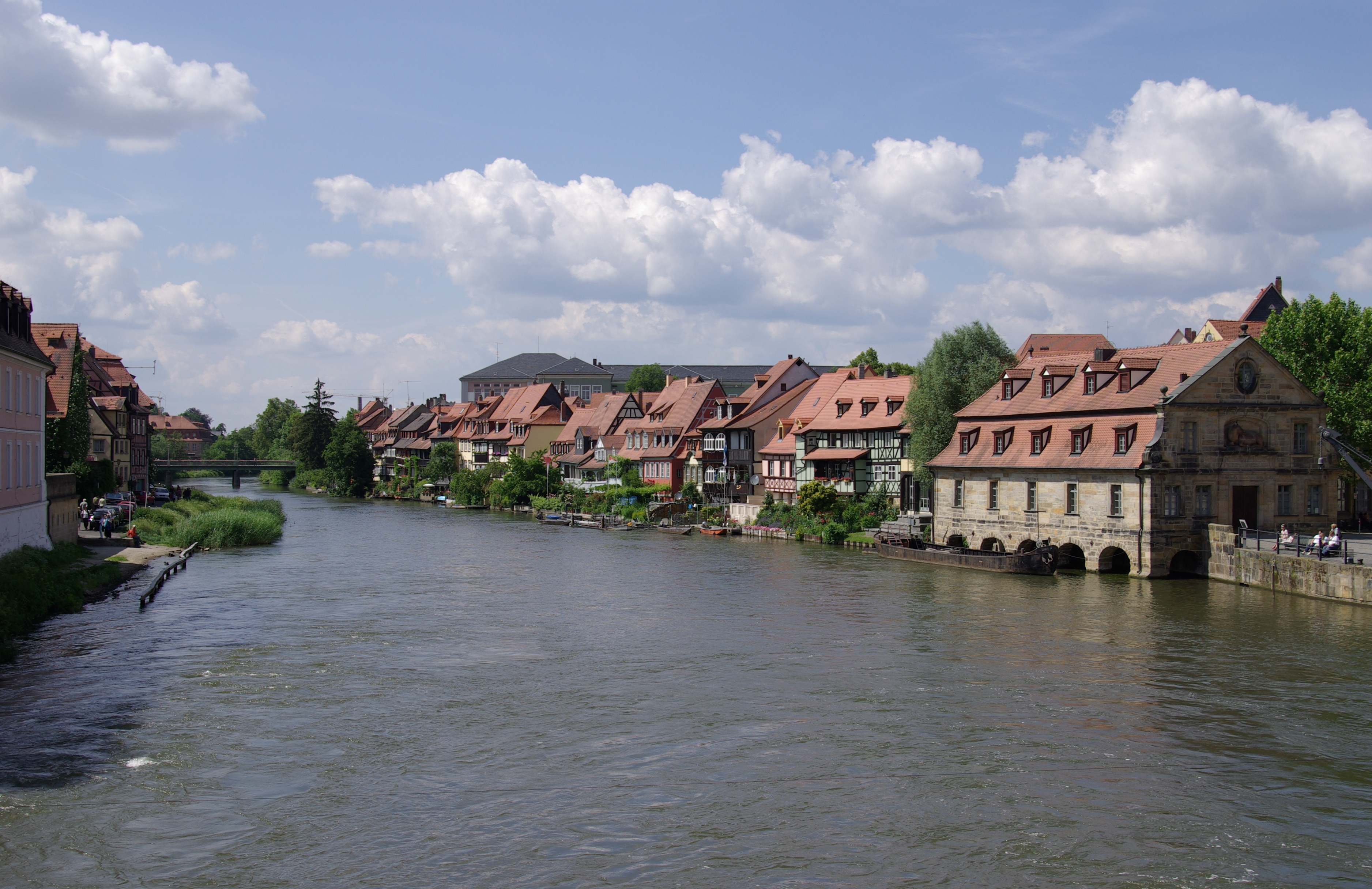 Blick auf Klein Venedig, Bamberg